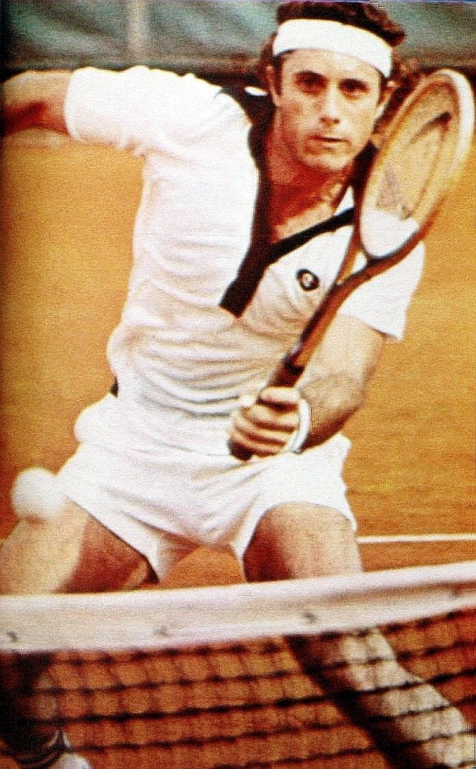 Guillermo Vilas, El Grafico del 22 de Marzo de 1977. Edicion 2998